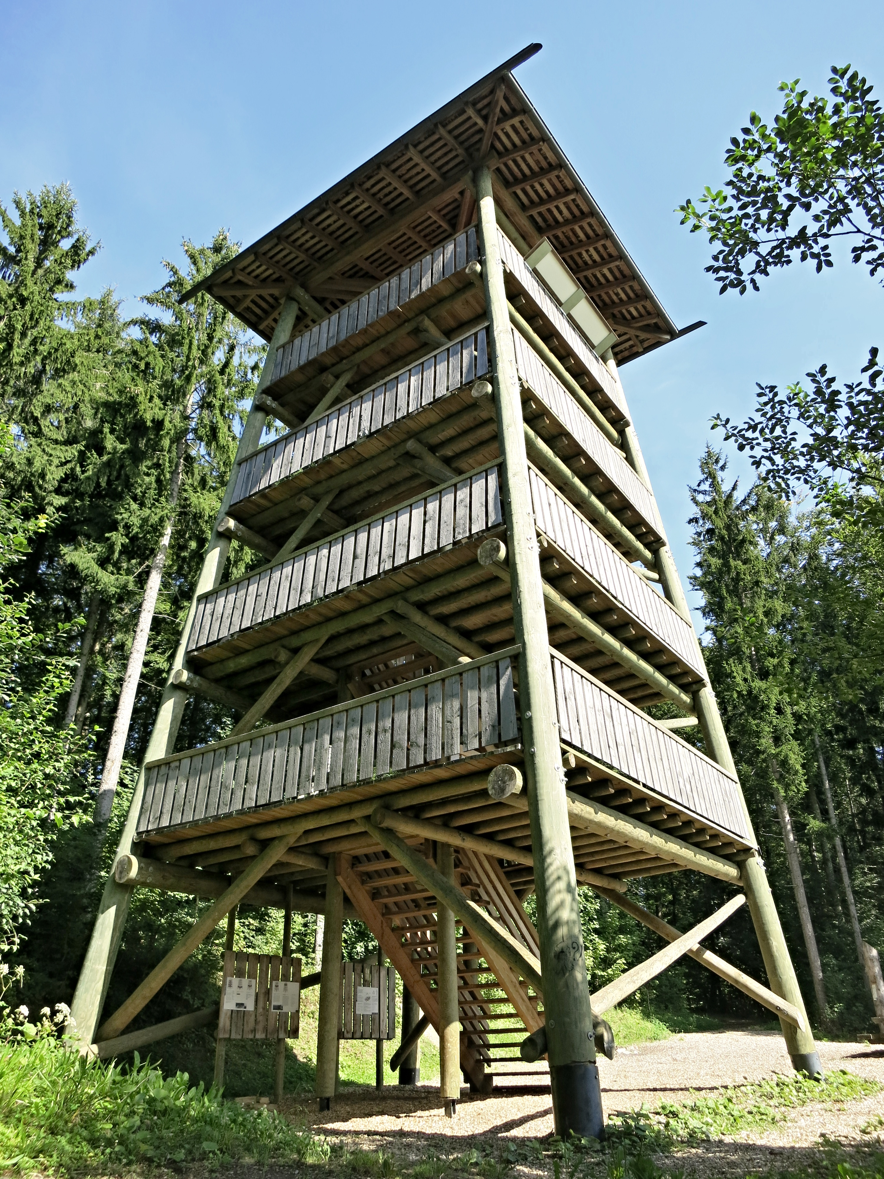 Donjon de Brigands Turm